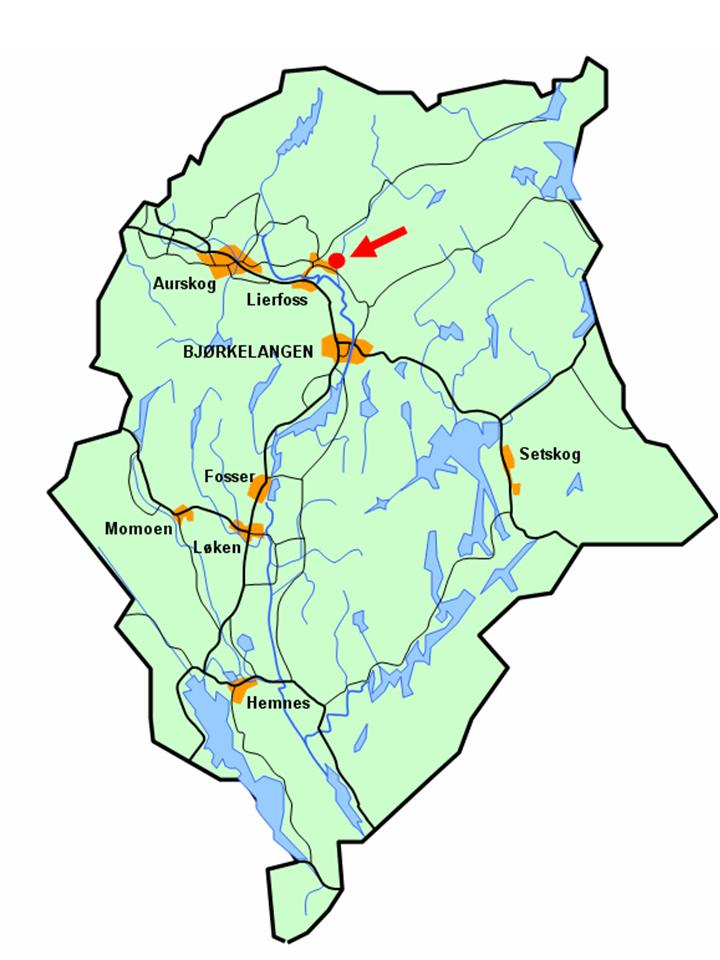 Dyrrudtjernets lokalisering i Aurskog-Høland kommune.